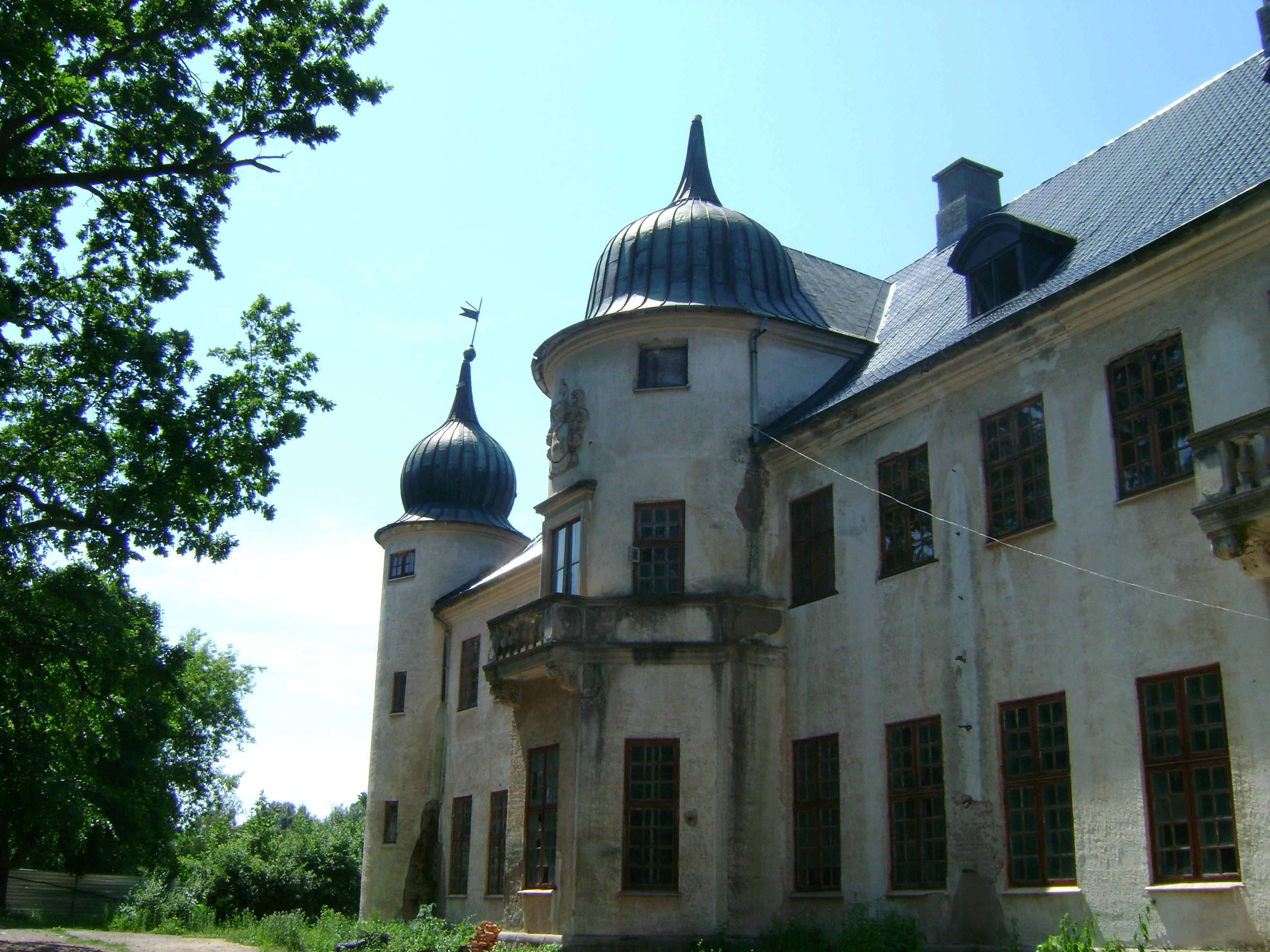 Мисливський замок(мур.), Тальне, вул.Радянська, 48